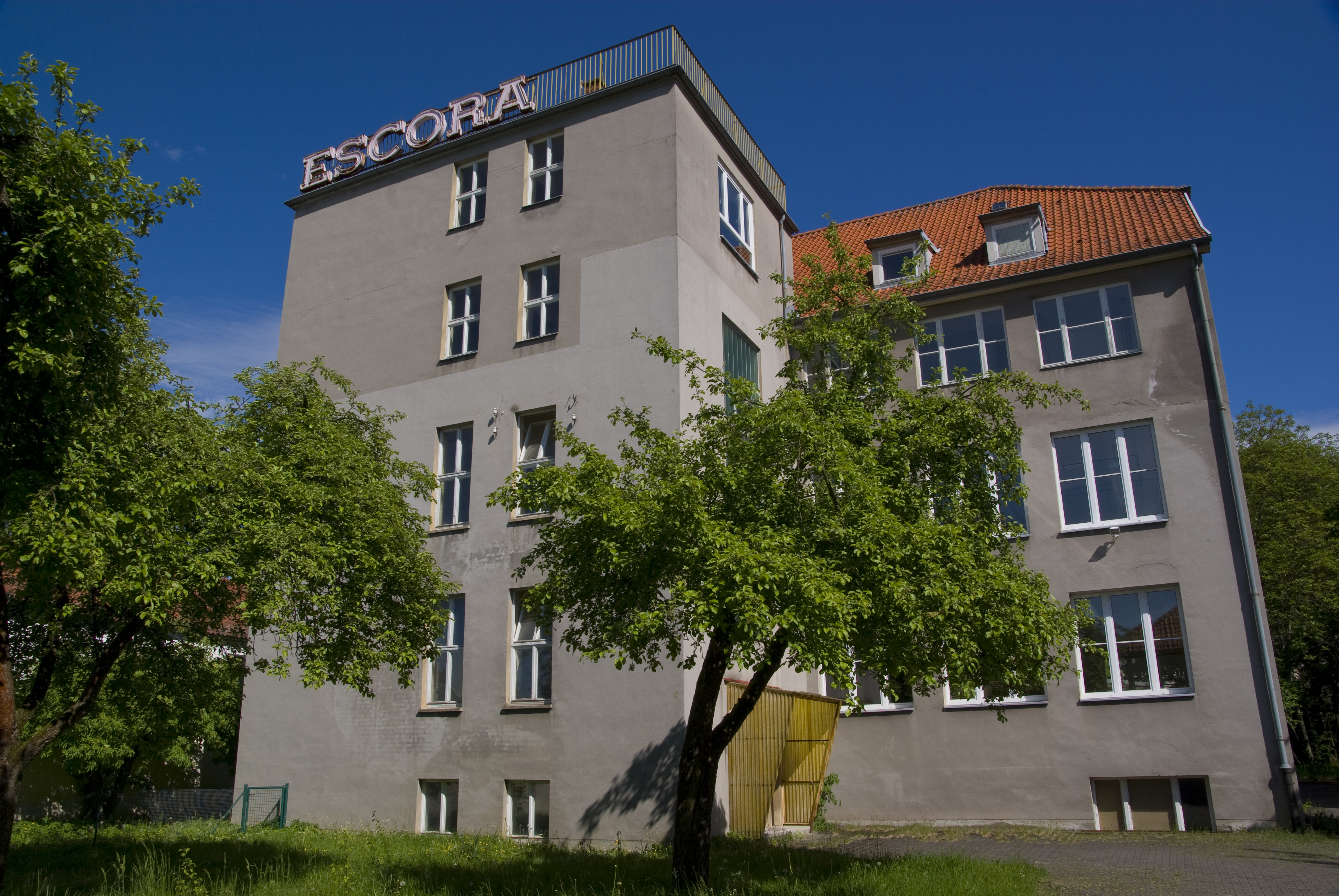 Escora Gebäude in der Rosenauer Straße 27 in Coburg. Rückseite